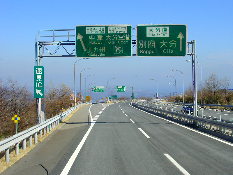 湯布院方面からの分岐点.